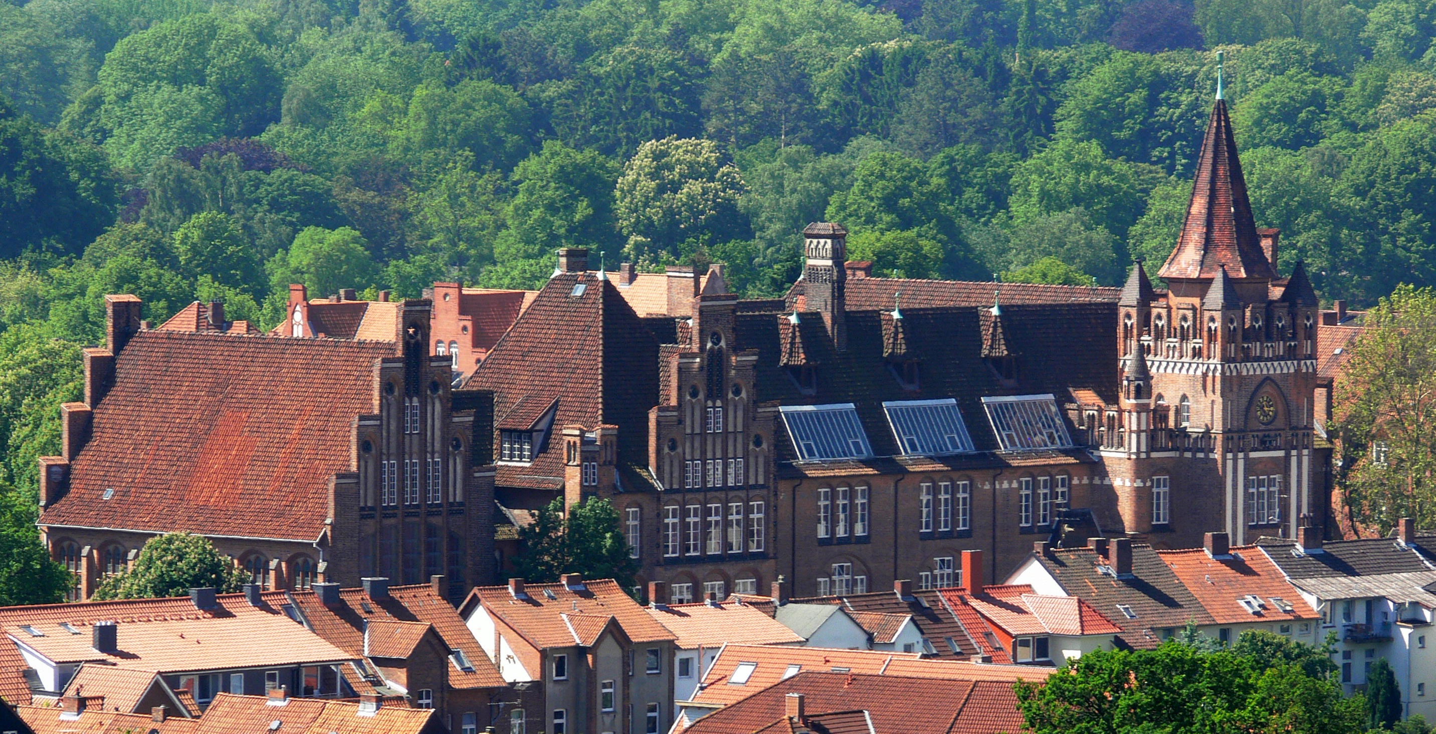 Lüneburg, Wilhelm-Raabe-Schule, vom Wasserturm aus gesehen